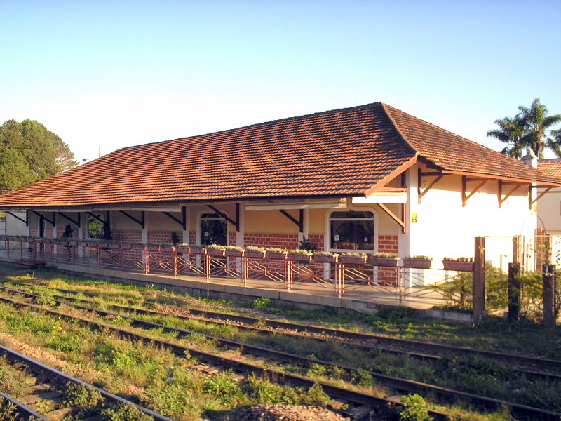 O Armazém - Centro Comercial, em Piraquara (Grande Curitiba), PR, Sul do Brasil. Antigo armazém de carga da Rede Ferroviária, atualmente é centro comercial destacando variedade de suvenir como: artesanato local e nacional, vinhos produzidos nas vinícolas da região e cosméticos nacionais. Também há uma sorveteria italiana, cafeteria, lanches, restaurante, com almoço diário, e café.